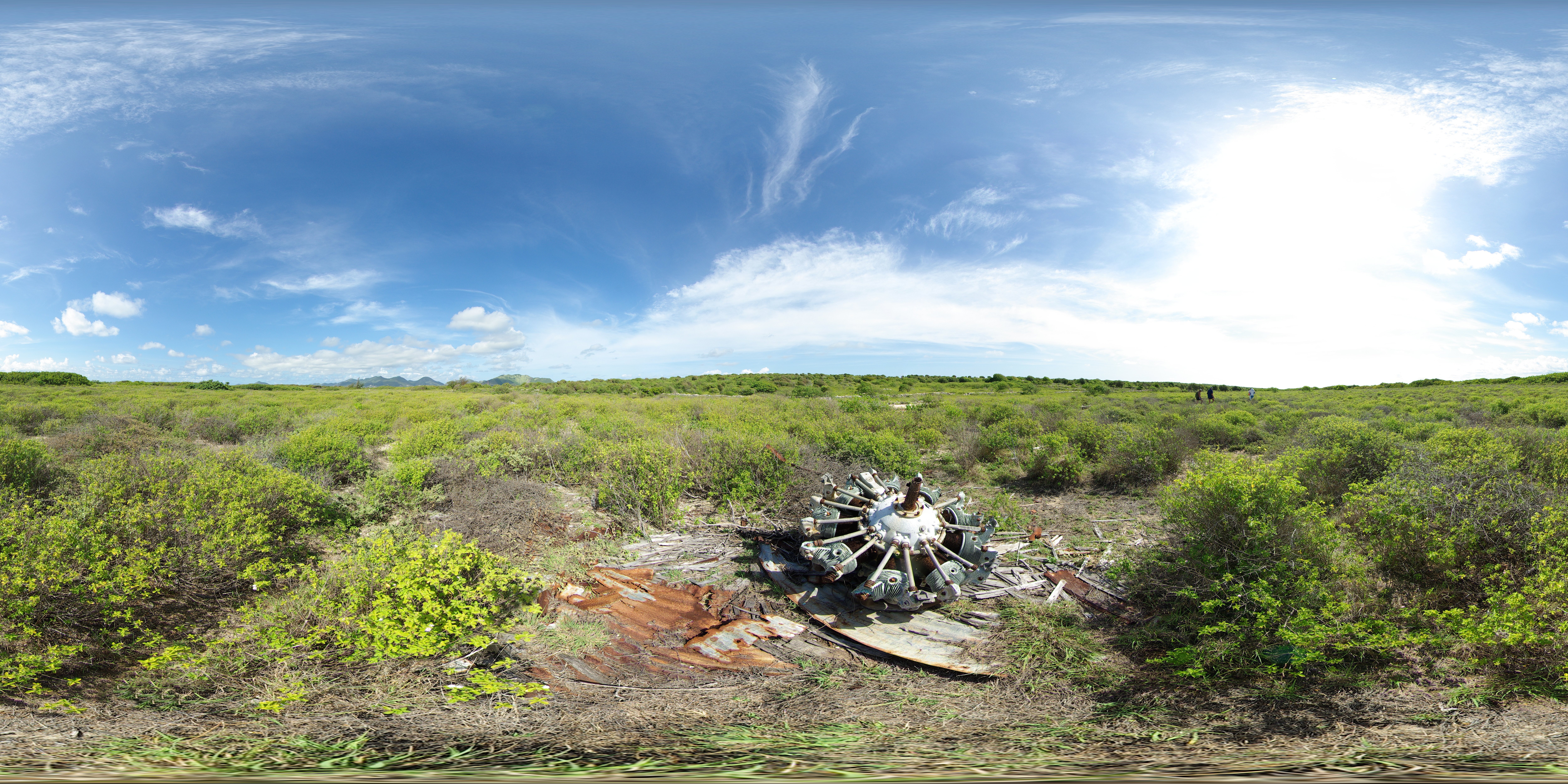 Equirectangular panorama built from 9 pictures.